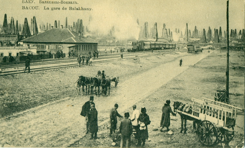 БАКУ. Балаханы-Вокзалъ